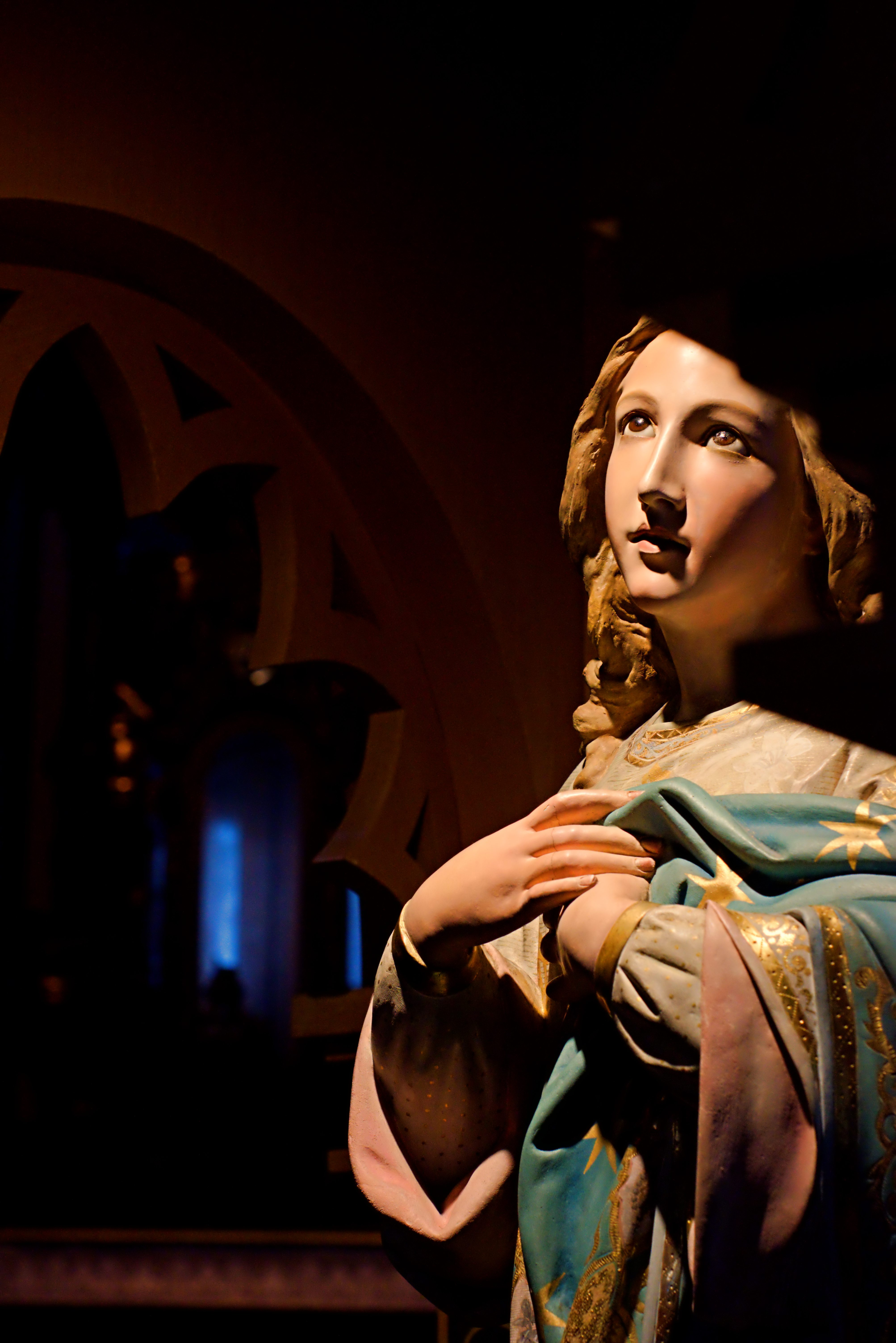 Fiz essa foto quando a imagem estava exposta fora do nicho em novembro de 2019.